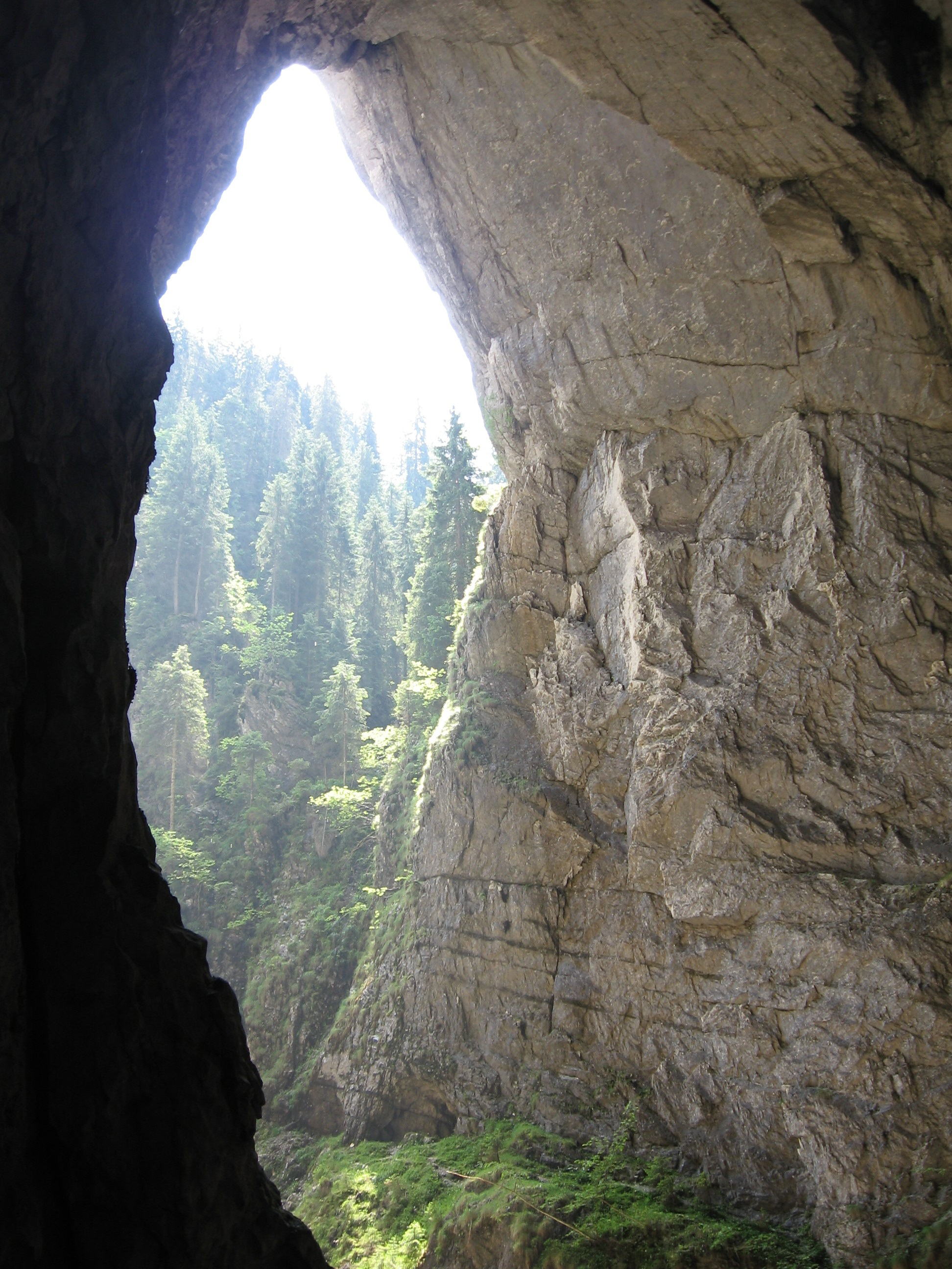 A Csodavár portálja, Bihar-hegység, Pádis-fennsík, Erdély